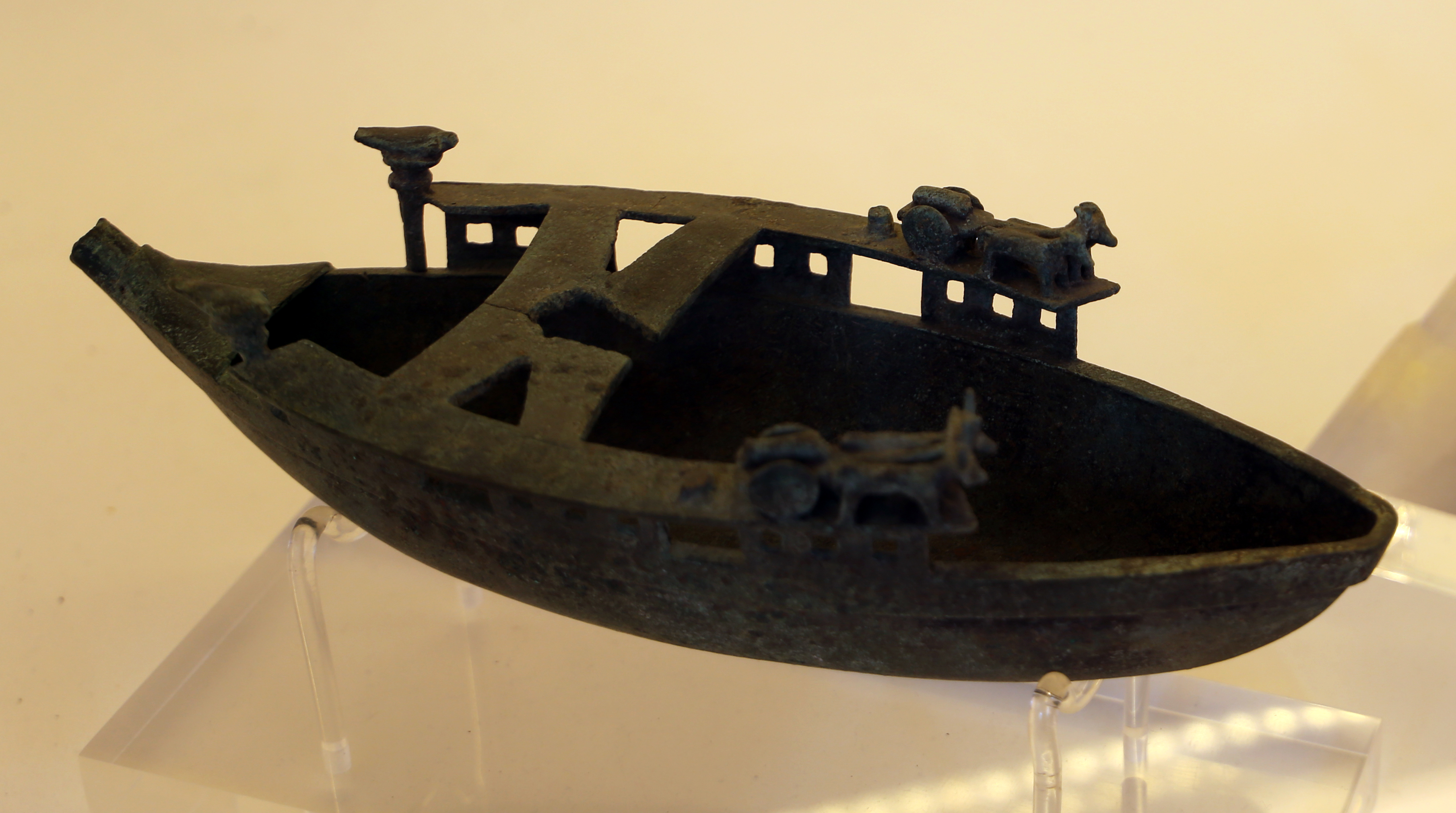 Palestra Grande This is a photo of a monument which is part of cultural heritage of Italy.